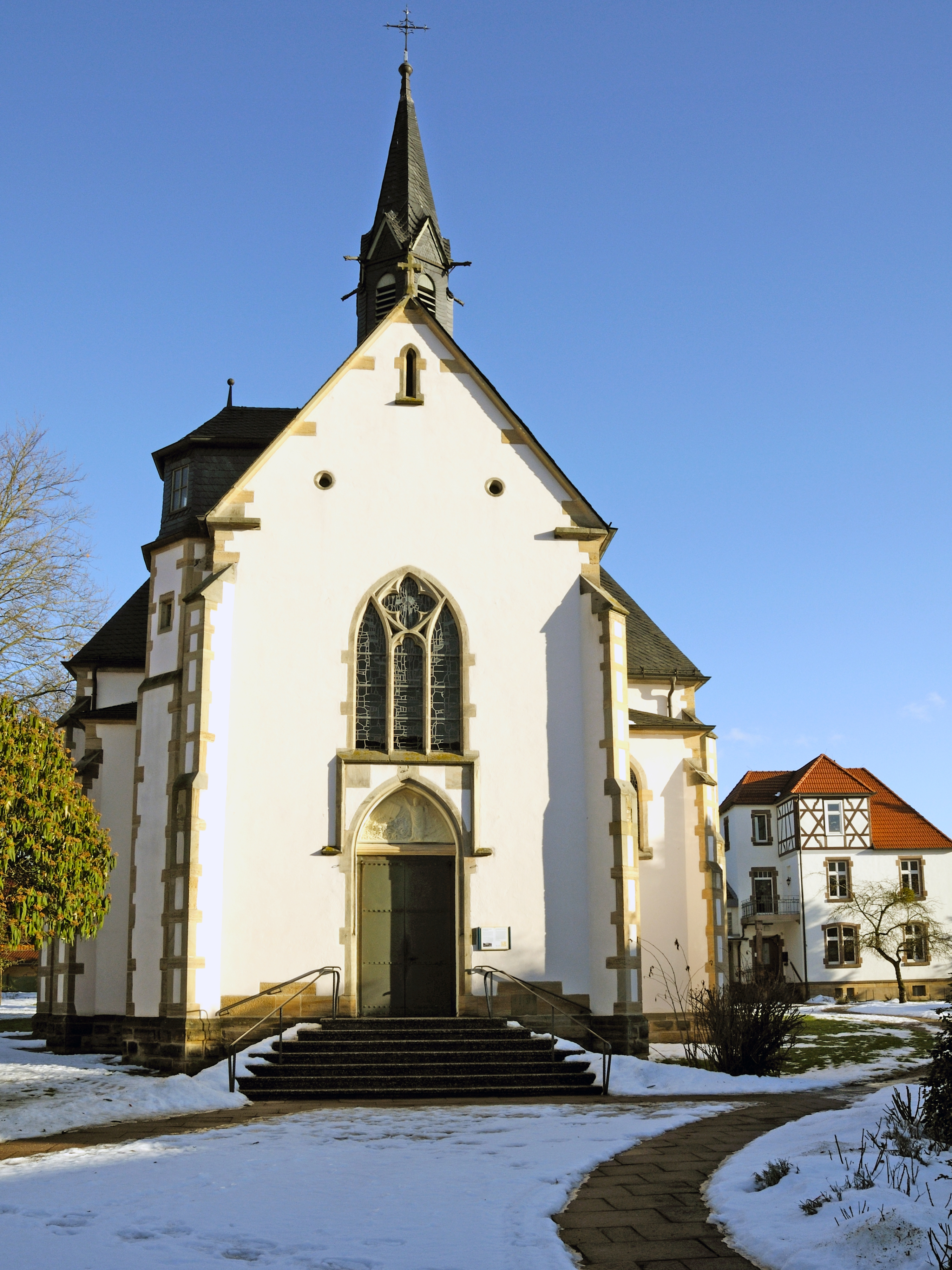 Kath. Stadtkirche Wanfried - Blick aus West